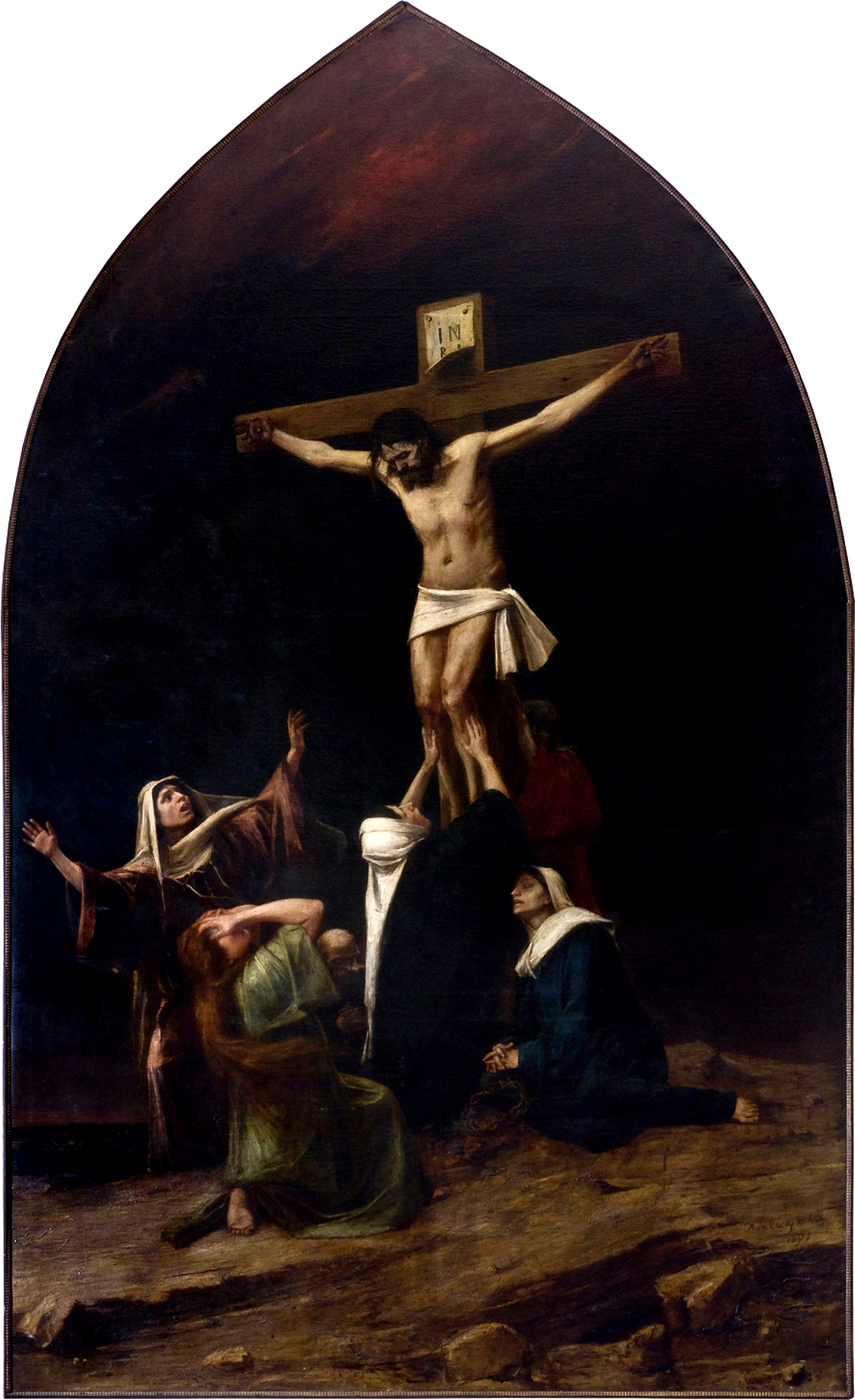 Munkácsy Mihály: Siratóasszonyok a keresztfánál (Beteljesedett), 1895. olaj-vászon 530 x 290 cm